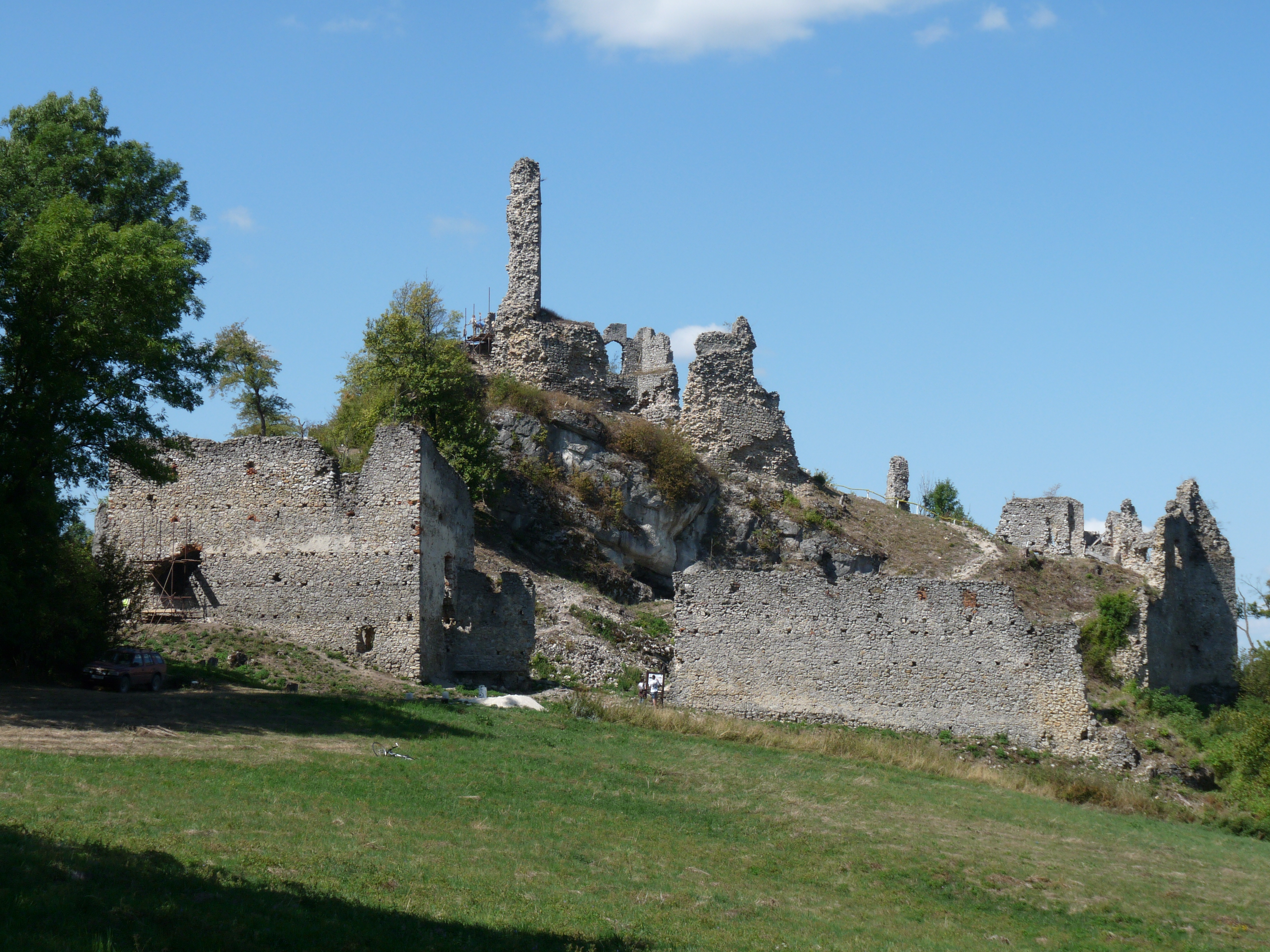 Hrad korlátka z prístupovej cesty